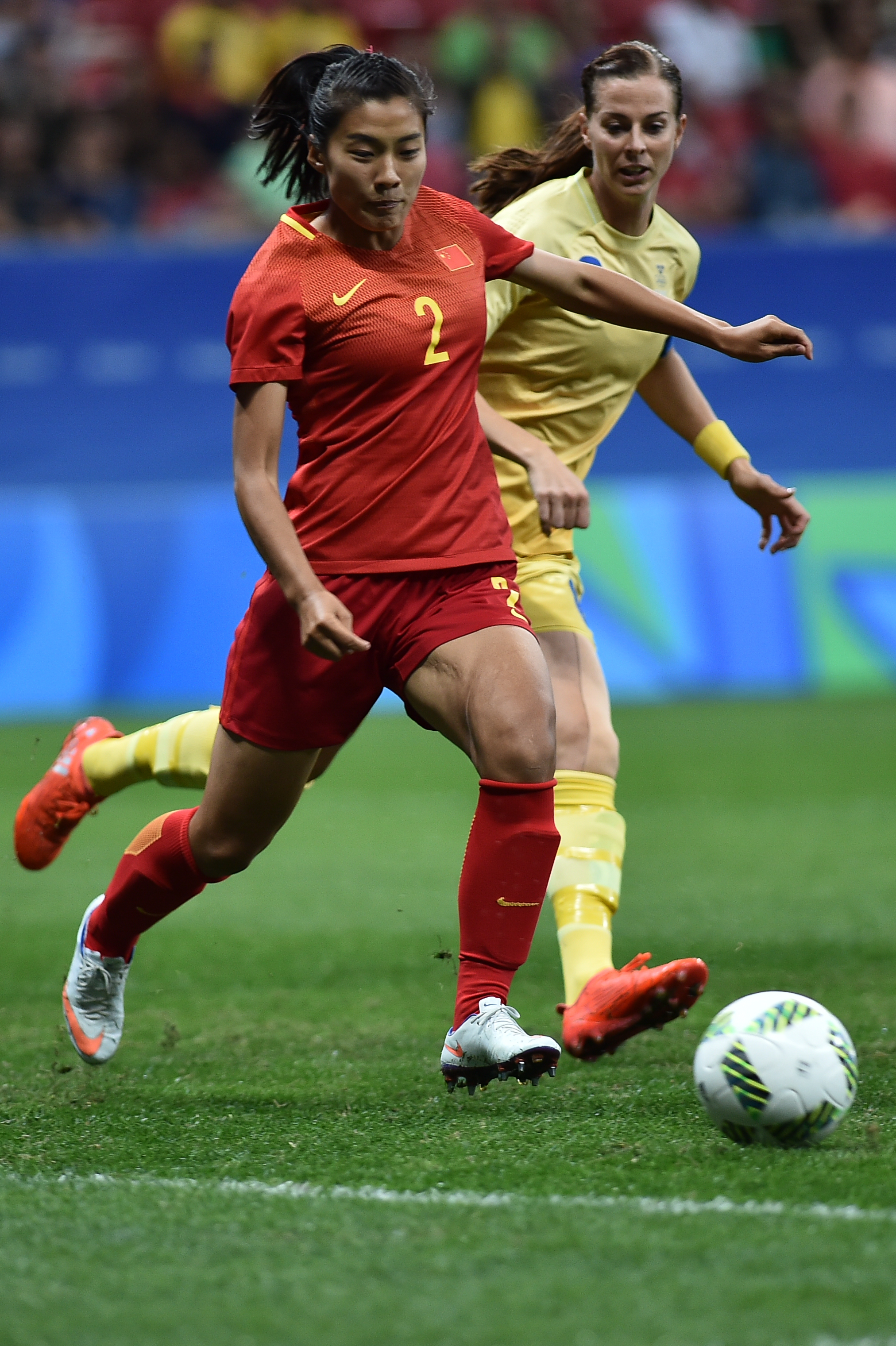 Estádio Nacional de Brasília Mané Garrincha, Brasília, DF, Brasil, 9/8/2016 Foto: Andre Borges/Agência Brasília China e Suécia jogam nesta terça-feira (9), no Estádio Mané Garrincha, pelo grupo E do futebol feminino nas Olimpíadas 2016.